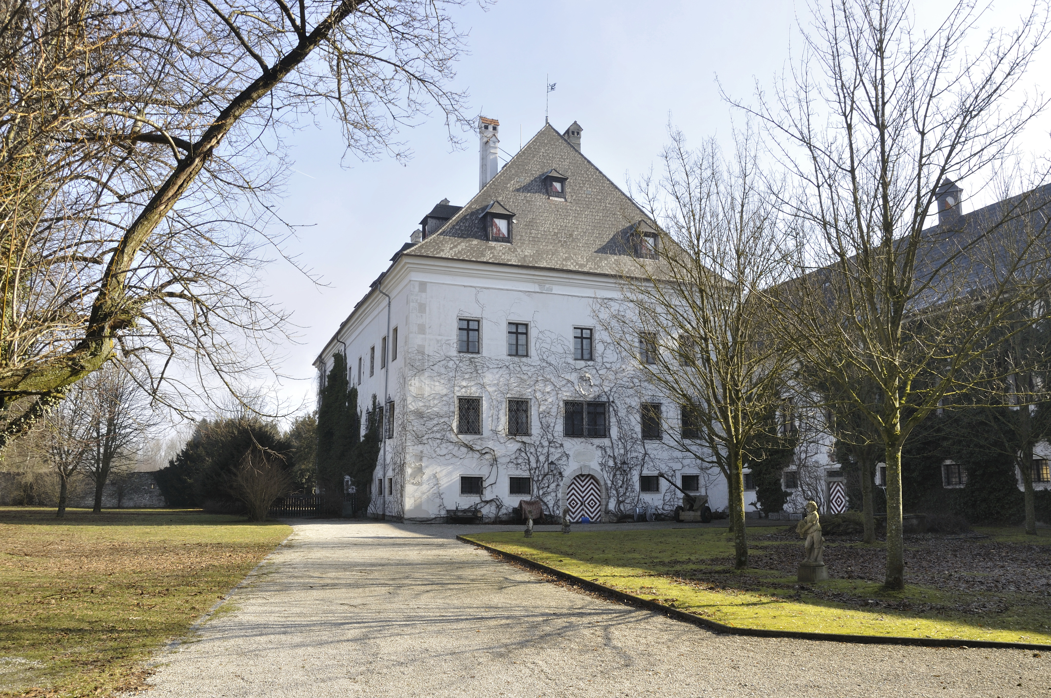 Schloss Neu-Scharnstein und Teile der Schlossmauer